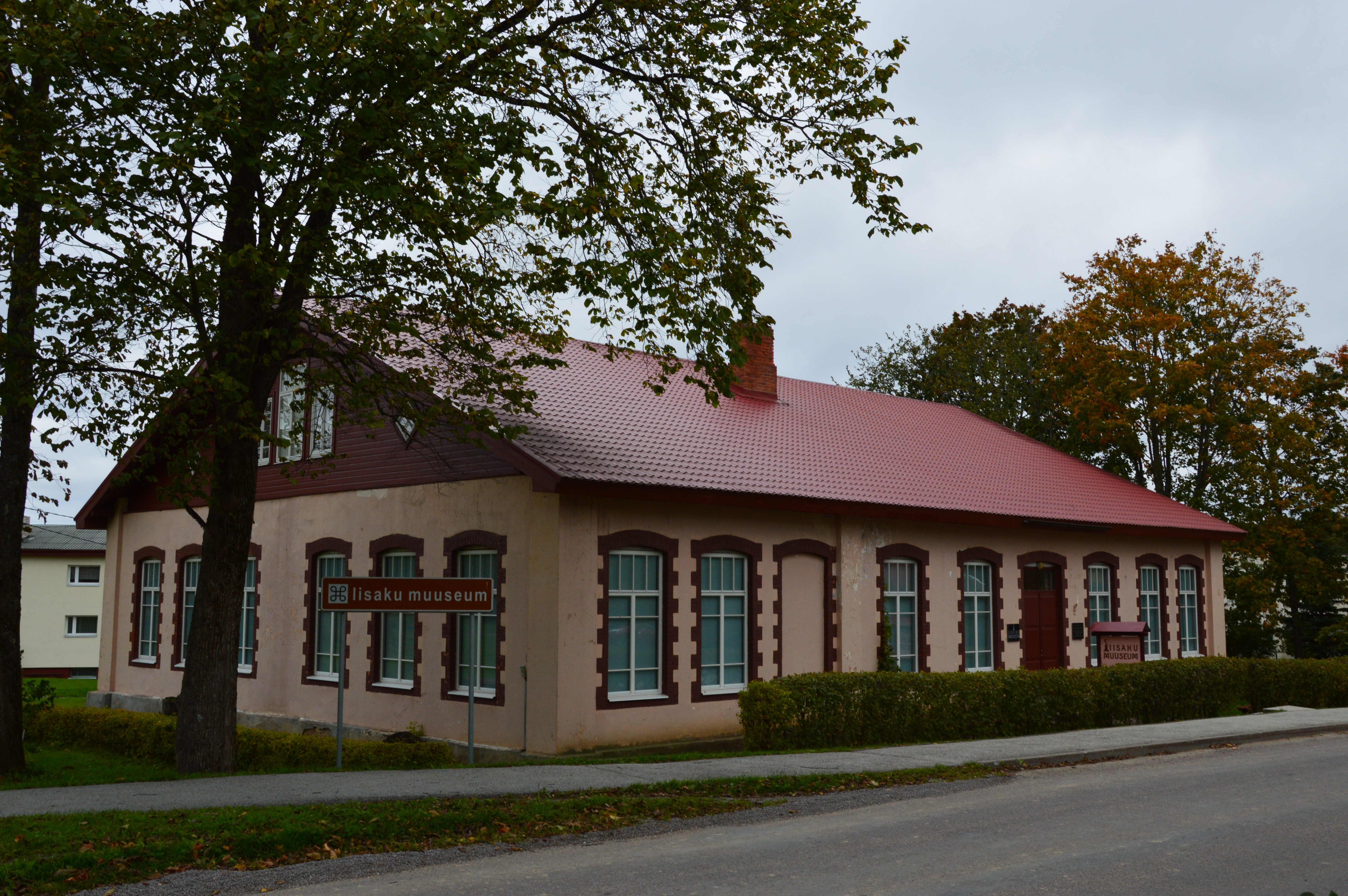 Iisaku muuseum